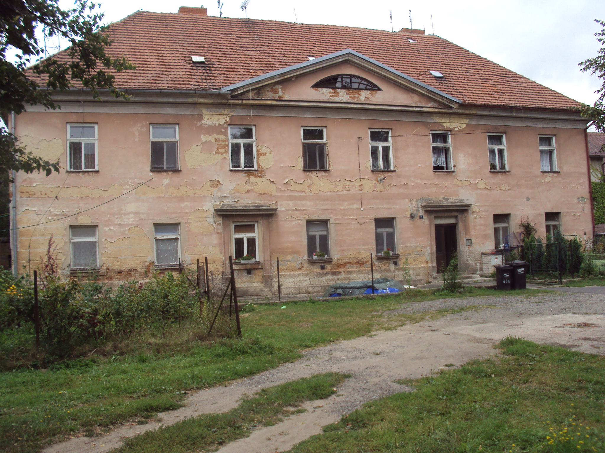 Státem chráněné stavení (kulturní památka)